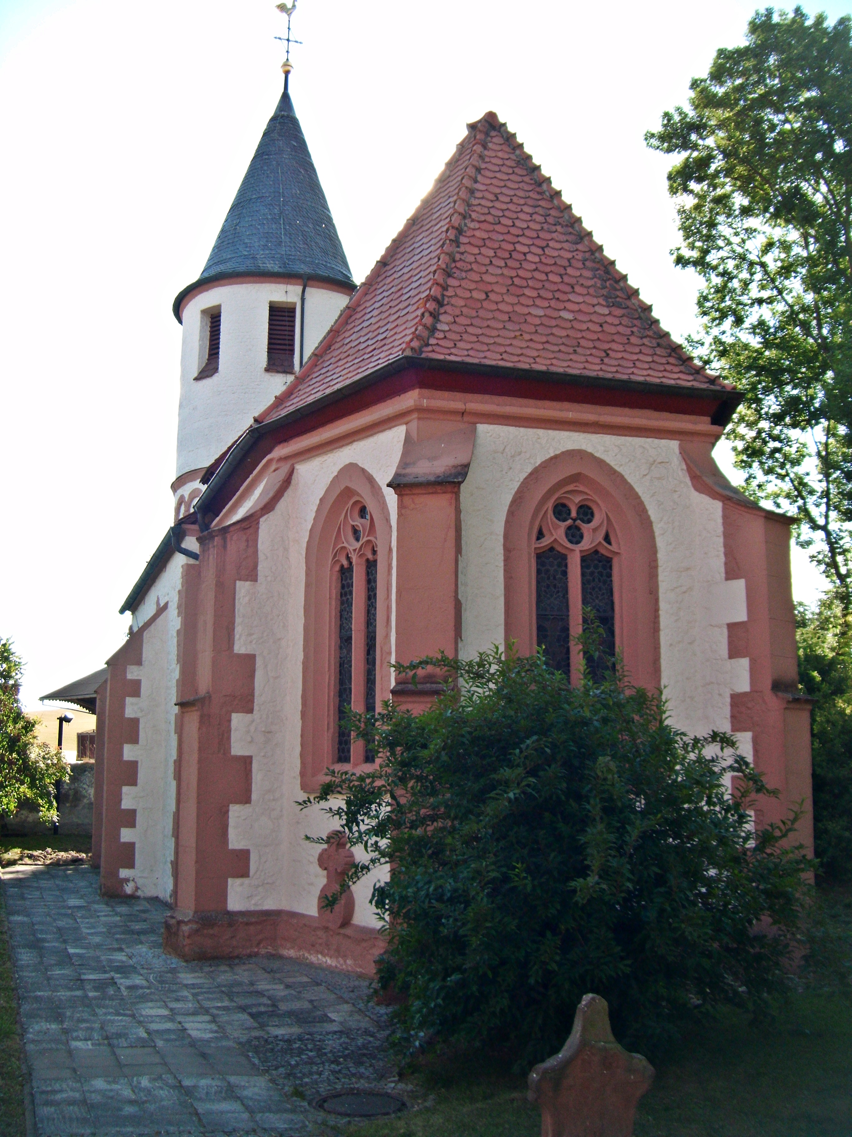 Quirnheim, Prot. Kirche